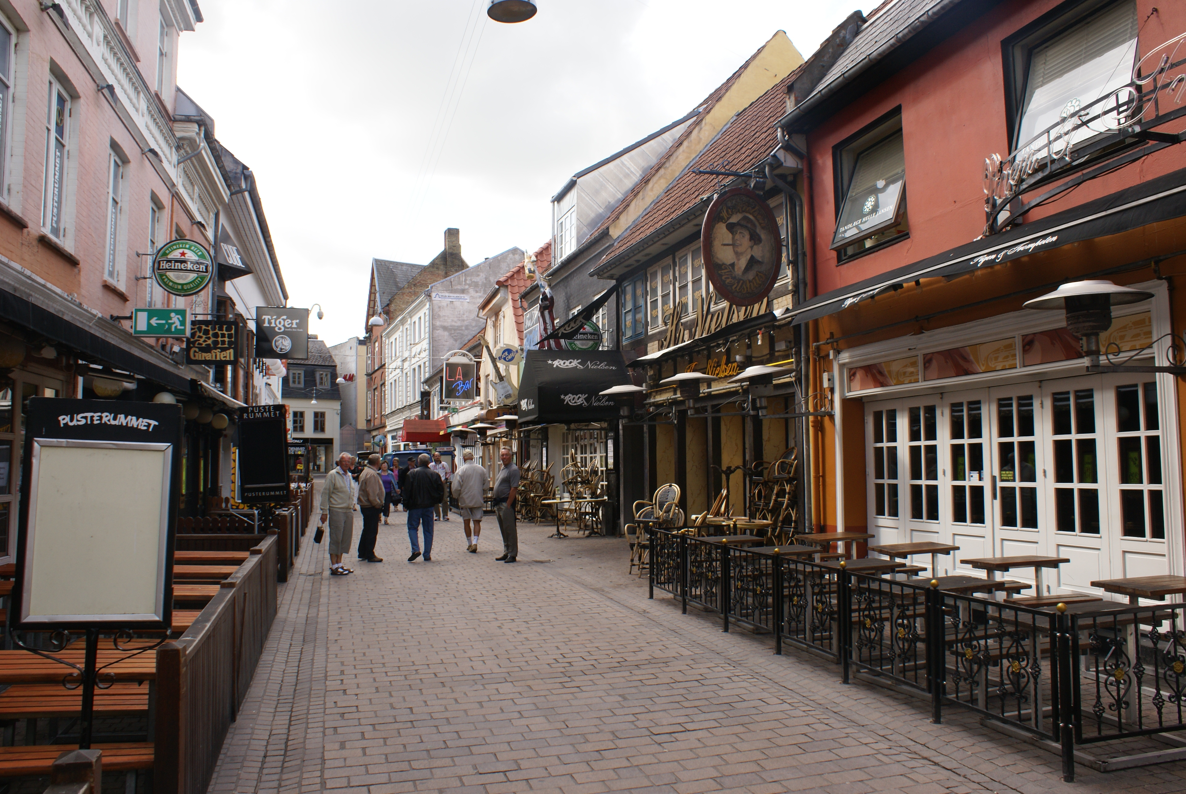 JOmfru Ane Gade, die Vergnügungsmeile von Aalborg